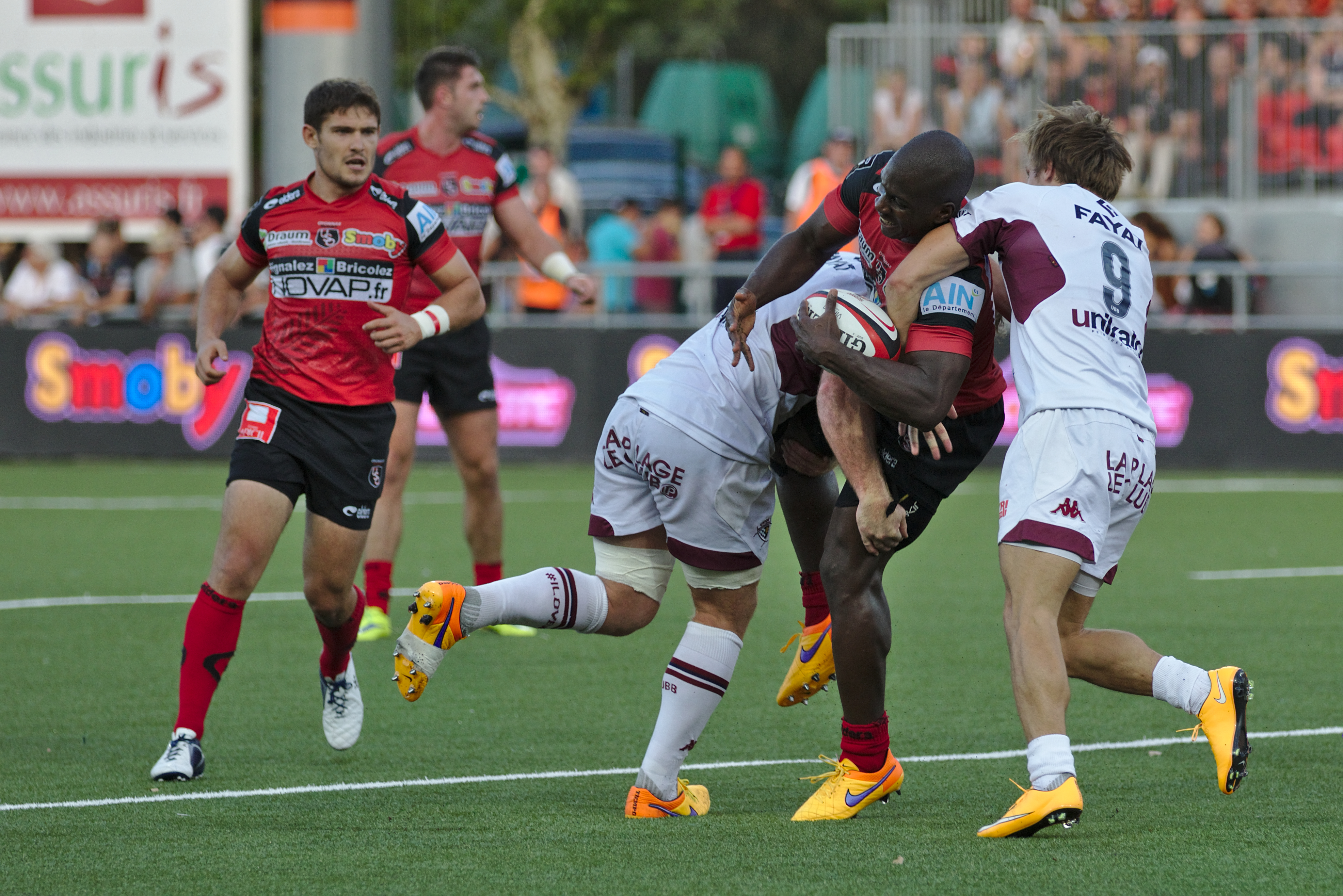 USO - UBB - 20150829 - Plaquage